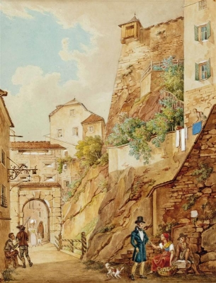 Das Steintor in Salzburg mit Figurenstaffage